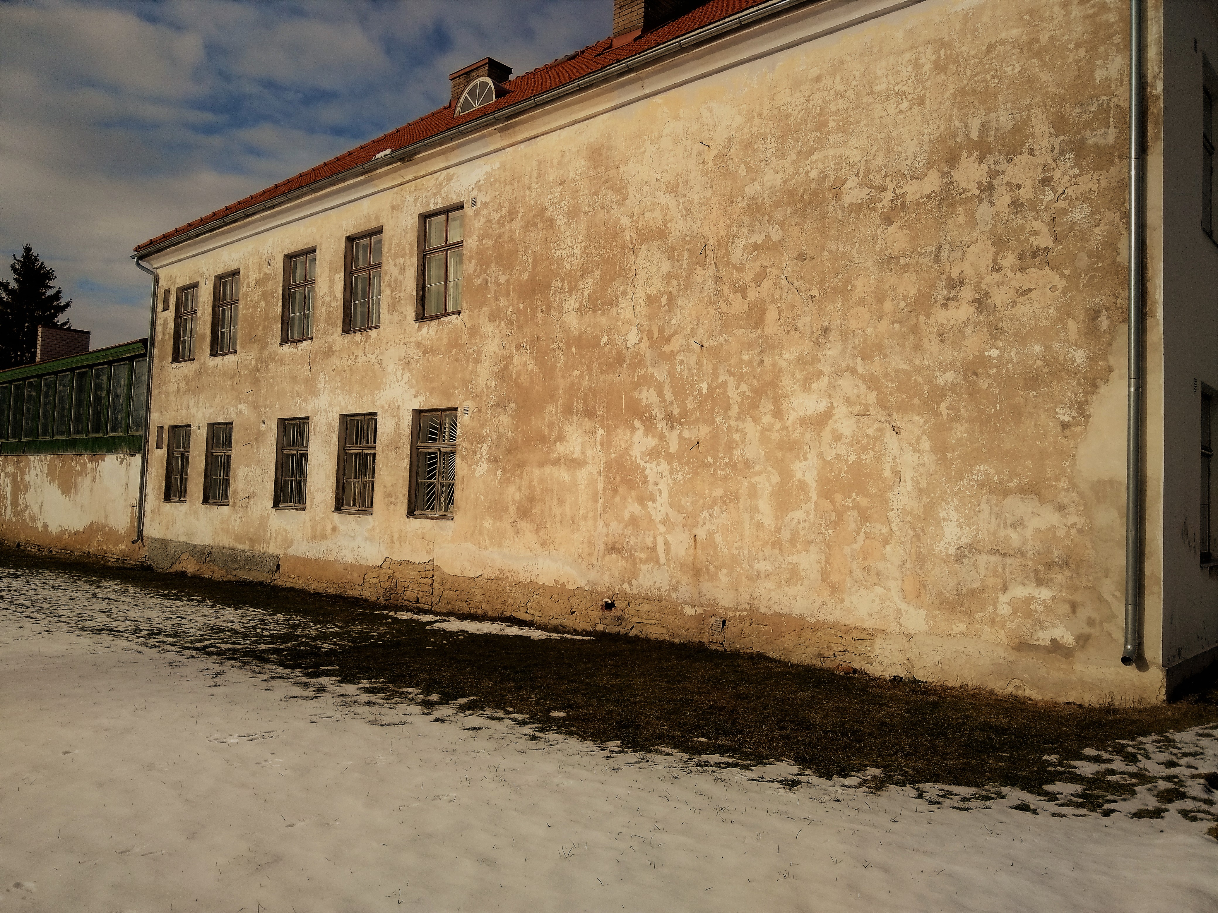 Vana valitsejamaja edelakülg, seinas on näha üks kinnimüüritud väiksem ja üks suurem ukseava.